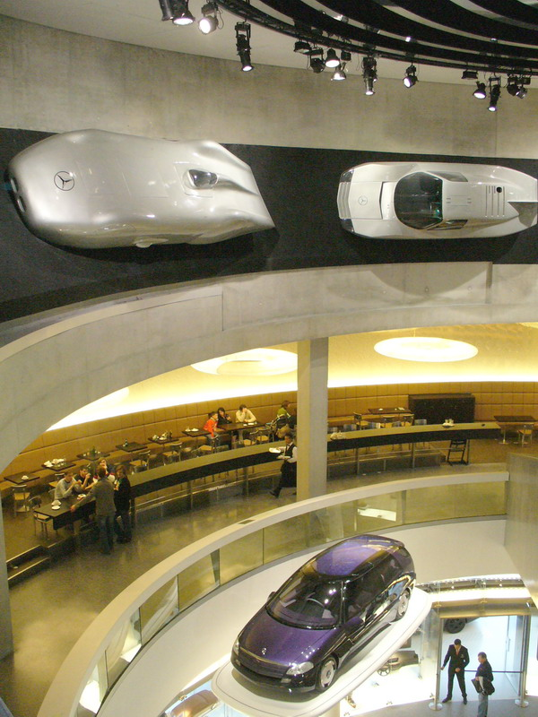 Mercedes-Benz Museum Stuttgart - Café